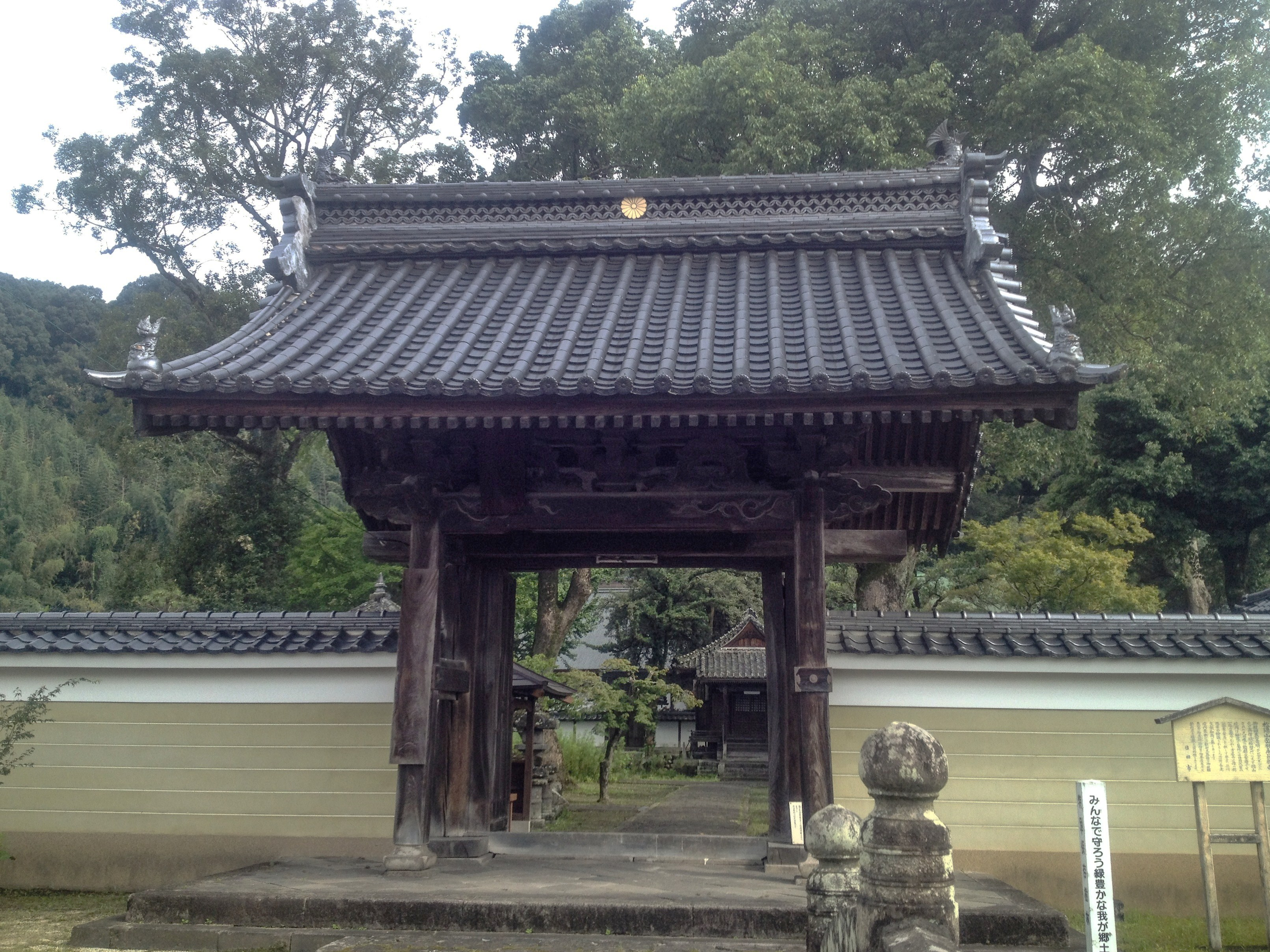 日田岳林寺・岳林永昌禅寺（ひたがくりんじ・がくりんえいしょうぜんじ）。大分県日田市にある寺院。現在の惣門を正面から撮影。創建当時の惣門の場所は確認されていない。